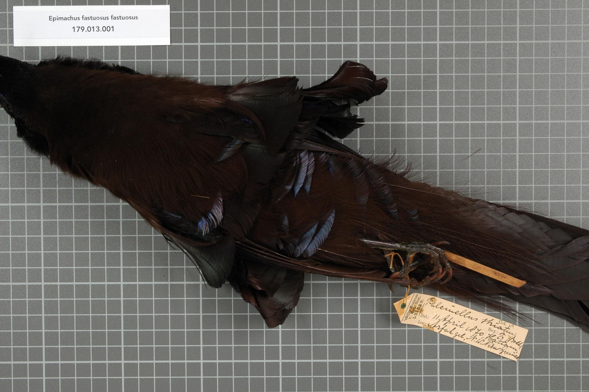 Epimachus fastuosus fastuosus (Hermann, 1783)